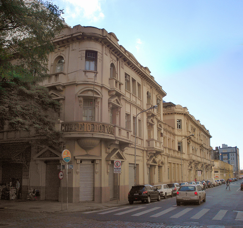 Edifício Hudson, sede do jornal Correio do Povo, em Porto Alegre, Brasil, um dos mais tradicionais do estado do Rio Grande do Sul